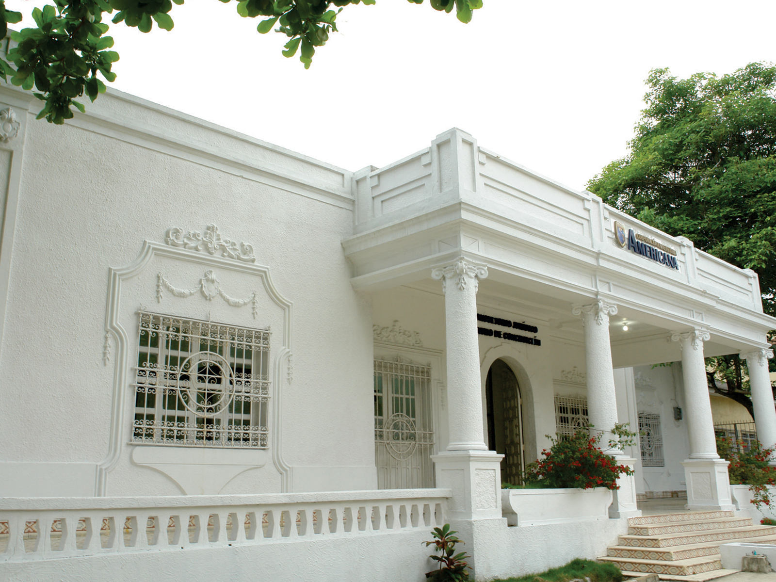 Sede Administrativa y Consultorio Jurídico de la universidad